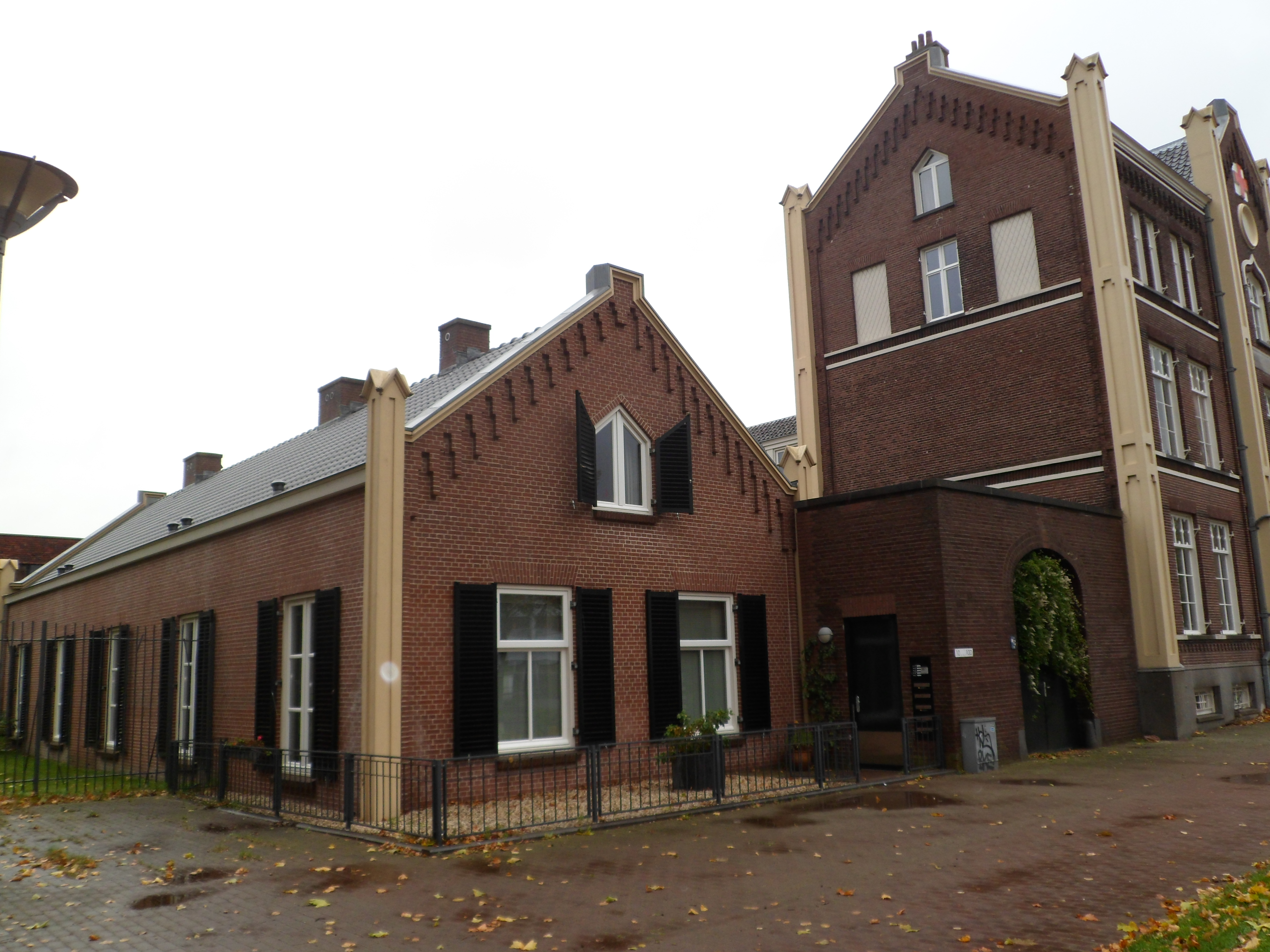 Een bijgebouw, gesitueerd aan de zijkant, van het Amaliahuis in 2012